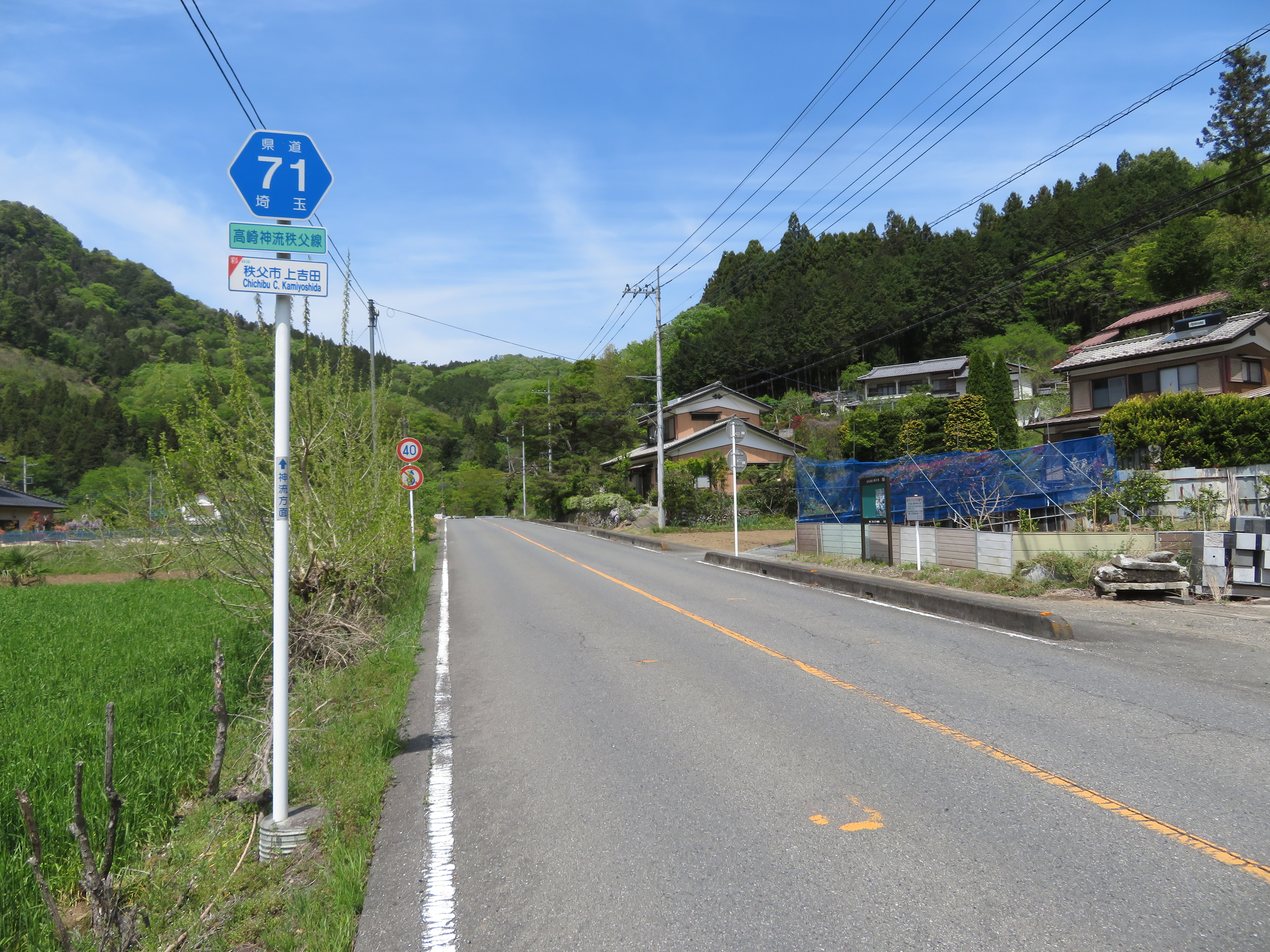 埼玉県道71号線秩父市上吉田付近（神流方面を撮影） Canon PowerShot SX720 HS